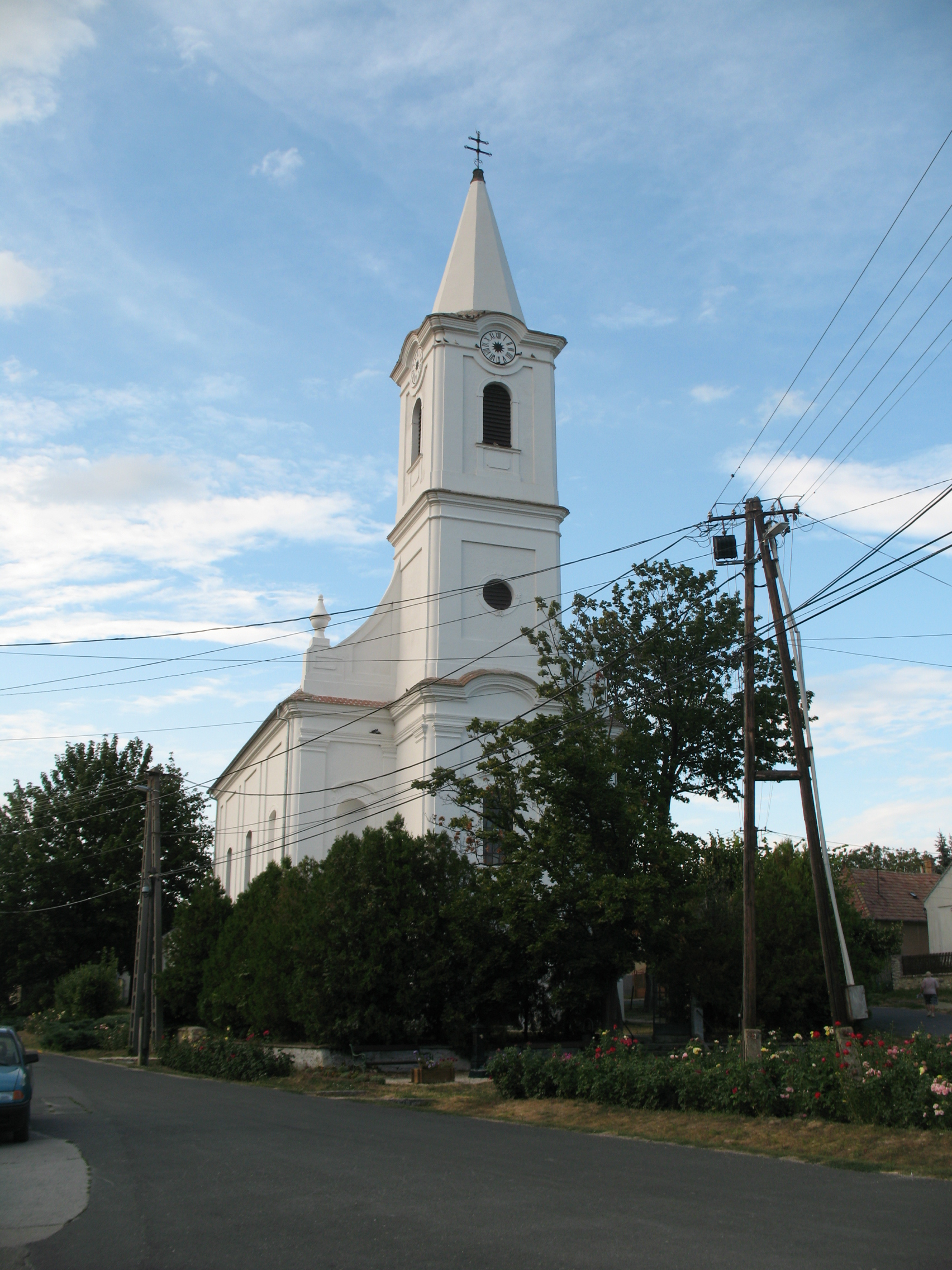 Balatoncsicsó